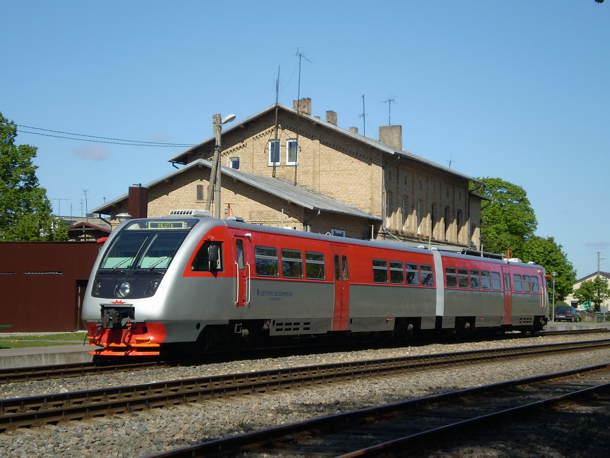 Дизель-поезд РА2-034 (модель 750.05.20) Литва, Клайпедский уезд, станция Шилуте